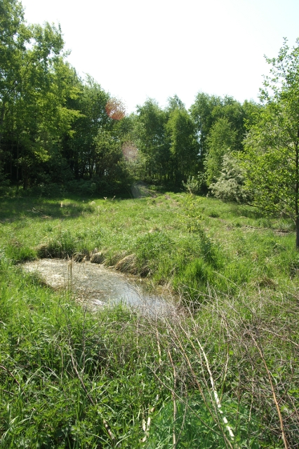 Křížkový Újezdec-Čenětice, okres Praha-východ. Pramen Botiče (po melioraci), tak ho bylo možno vystopovat proti proudu až do Ovčár. Původní pramen v lese nenalezen, je ale zřejmé, že musí ležet v prodloužené linii potoka směrem do lesa, tj na snímku přibližně vlevo proti nejmenšímu spádu vrstevnic.